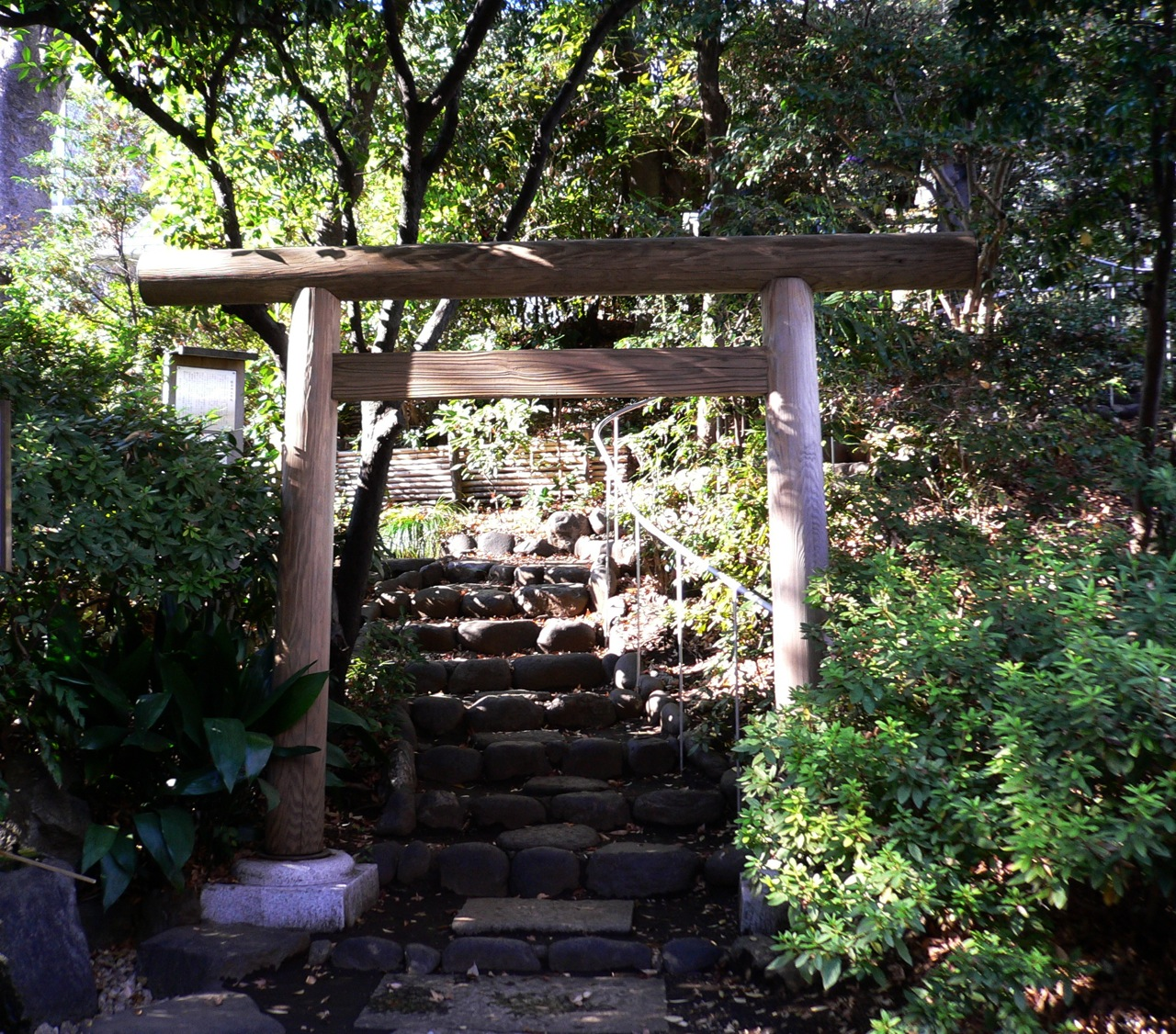 Sarugaku Shrine in Sarugakucho, Shibuya, Tokyo, Japan.